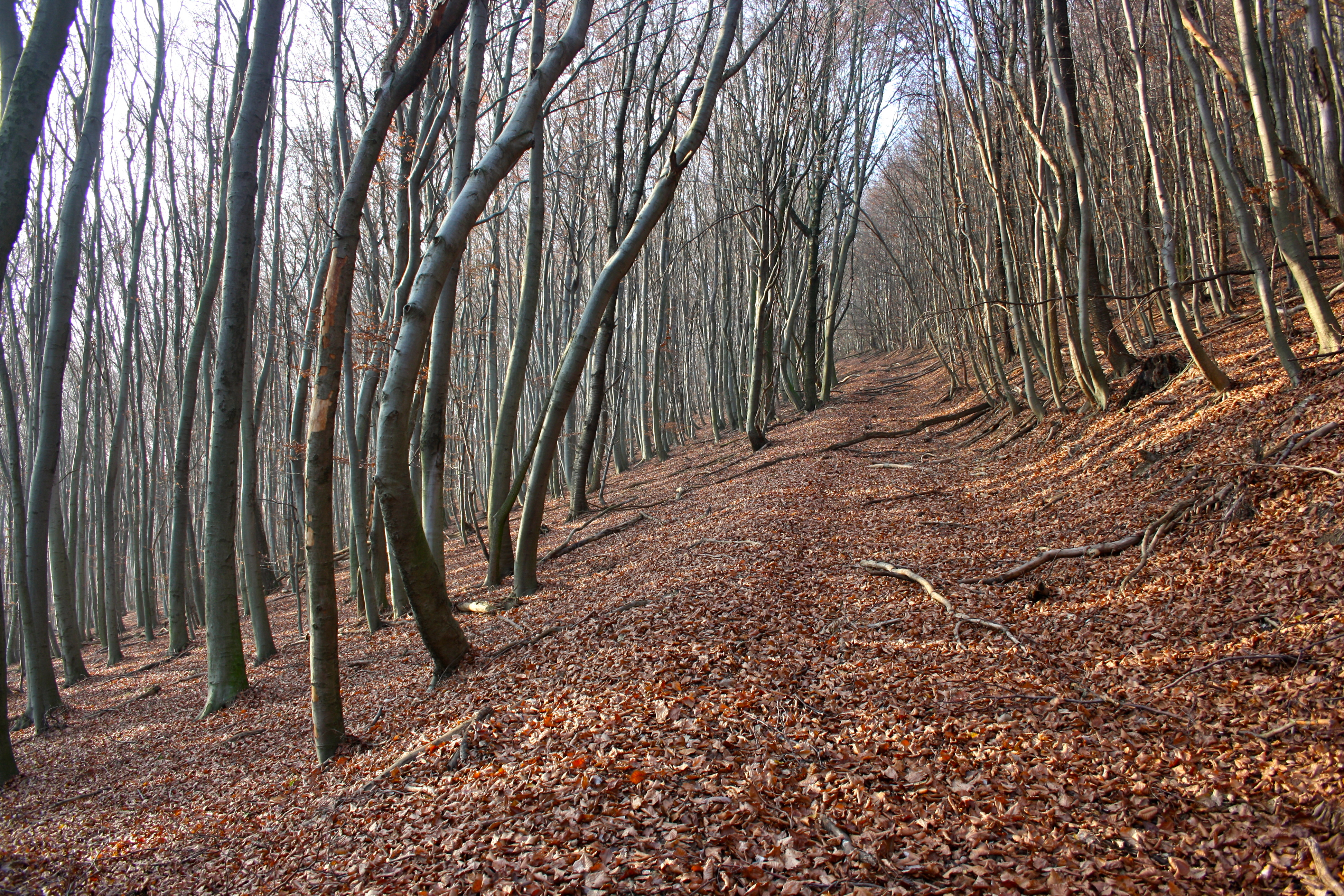 Waldweg am Hochbruckenberg in Wien-Hadersdorf.